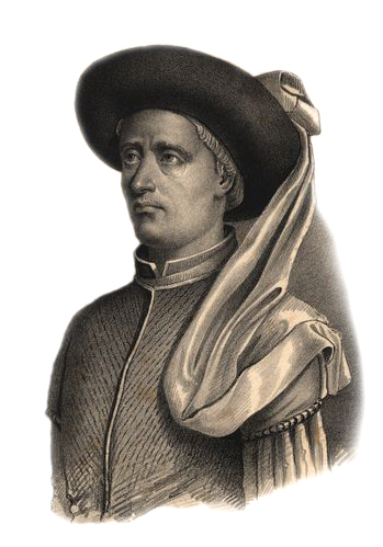 Infante Dom Henrique, o Navegador, (1394-1460), príncipe português.